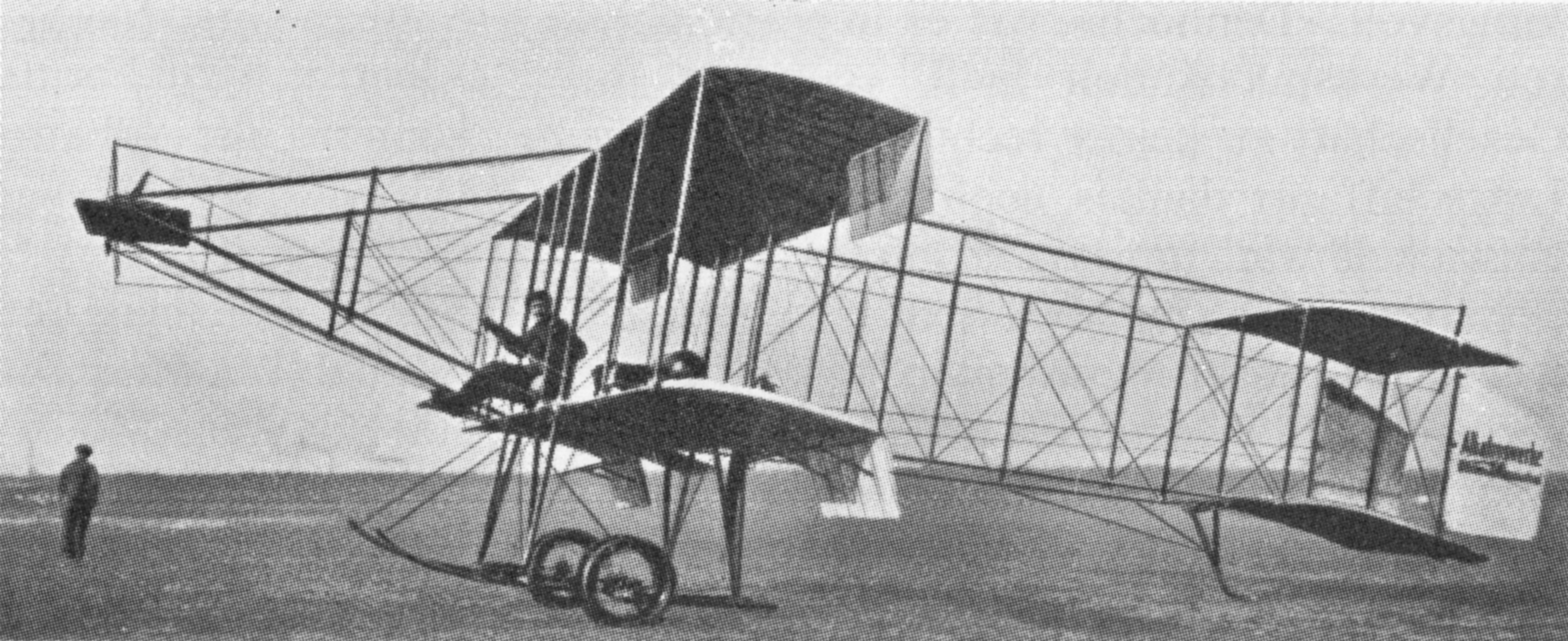 Ein Farman Doppeldecker der "Albatroswerke" am Flugplatz Johannisthal. Am Seitenruder ist der Schriftzug Albatroswerke zu erkennen.